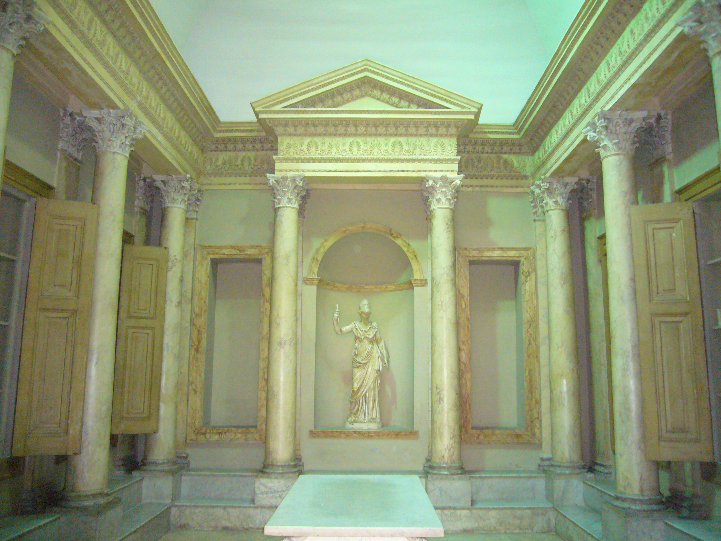 Roma, Museo della civiltà romana. ricostruzione di una biblioteca. Sullo sfondo, una statua di Minerva